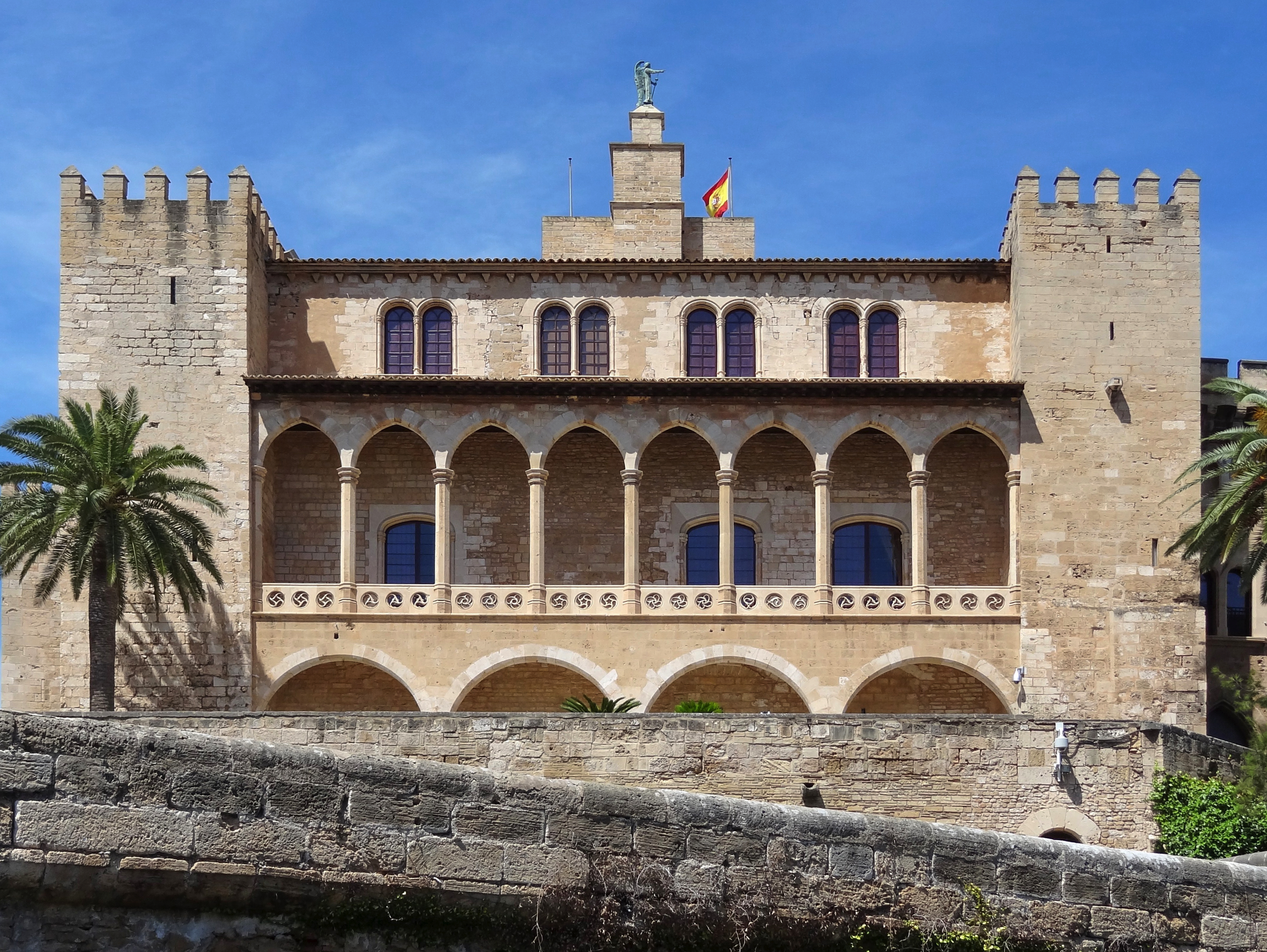 Königlicher Palast von s’Almudaina in Palma, Mallorca, Spanien